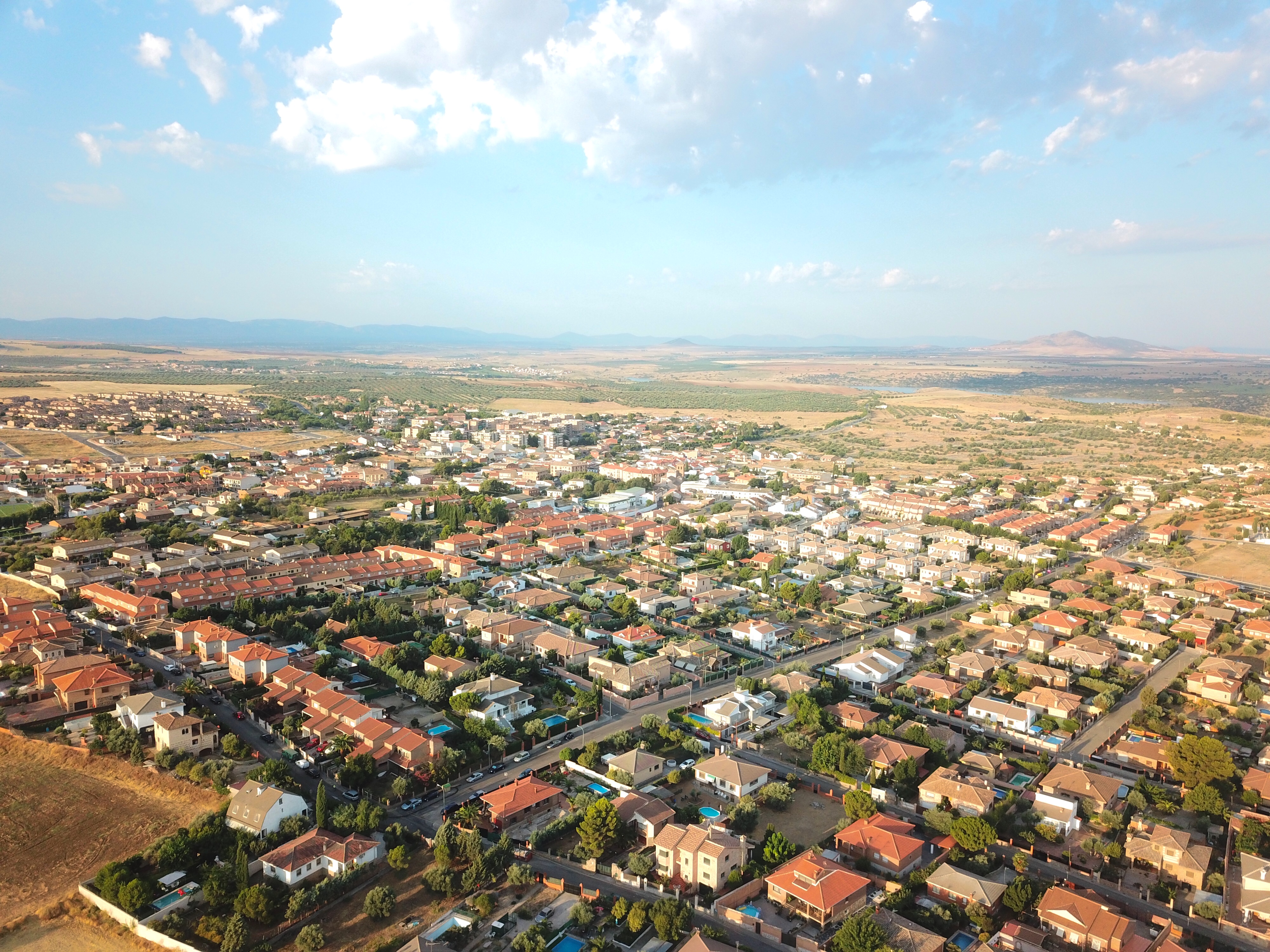 Fotografía hecha con drone respetando la normativa aplicable a este tipo de aeronaves en el momento de realizar la toma.